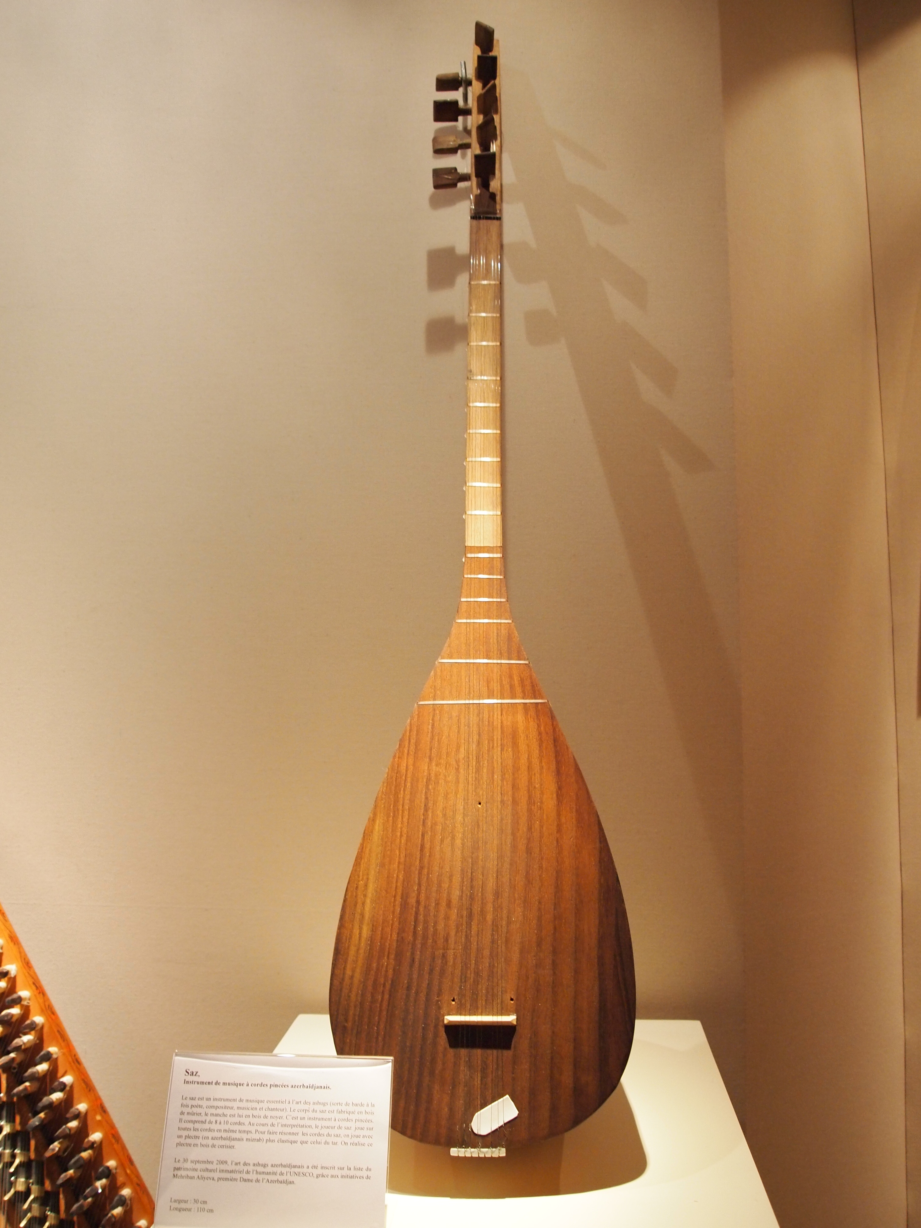 Saz, instrument de musique à cordes pincées. Exposition Azerbaïdjan au musée de Cognac nov 2012